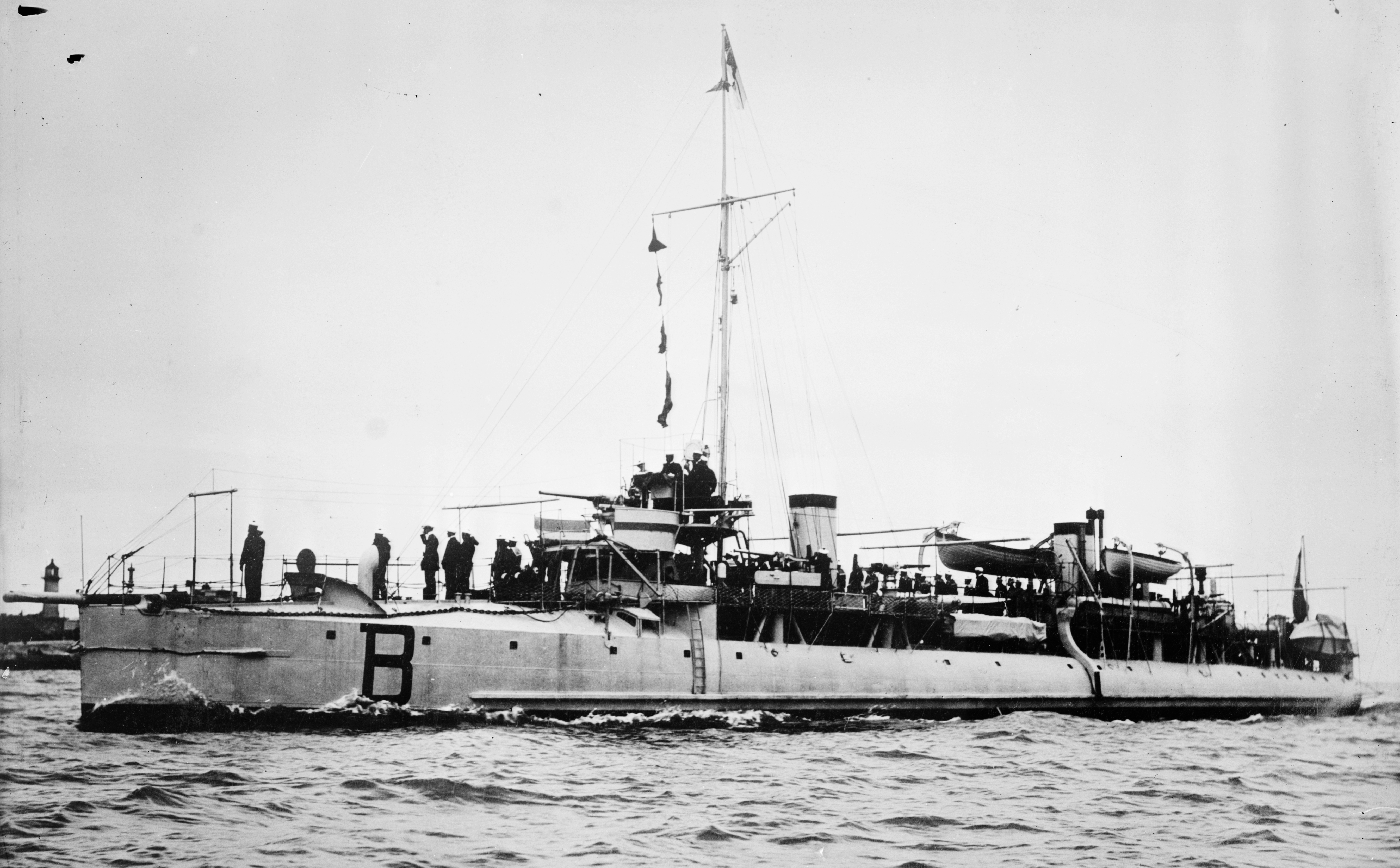 French destroyer Bombarde